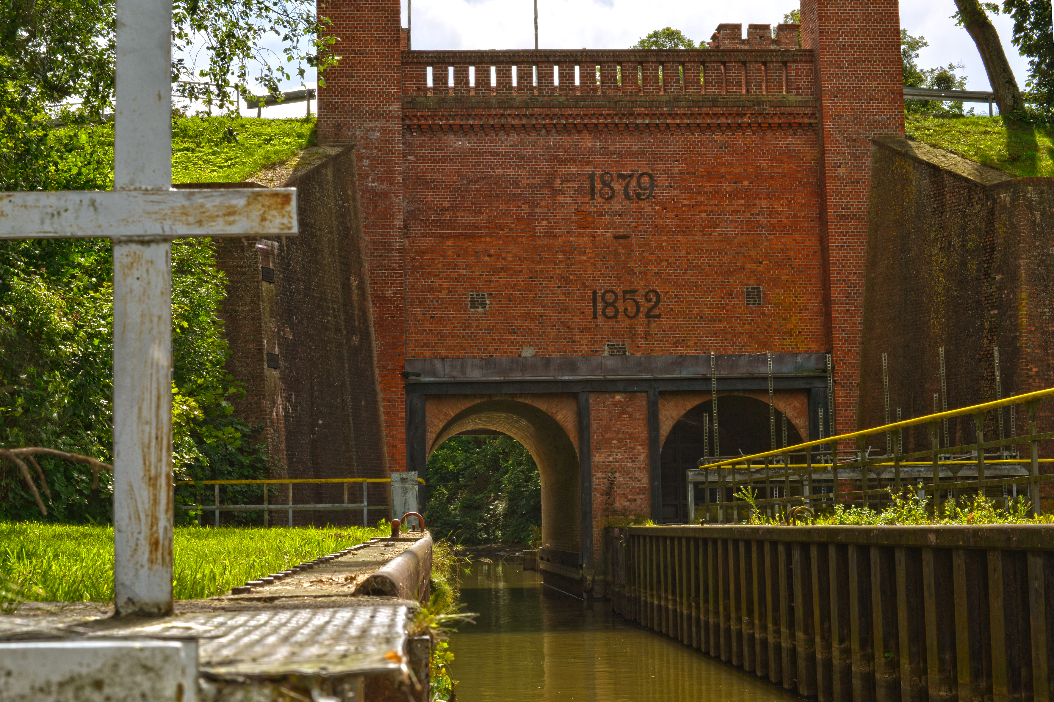 Zespół śluz w Białej Górze